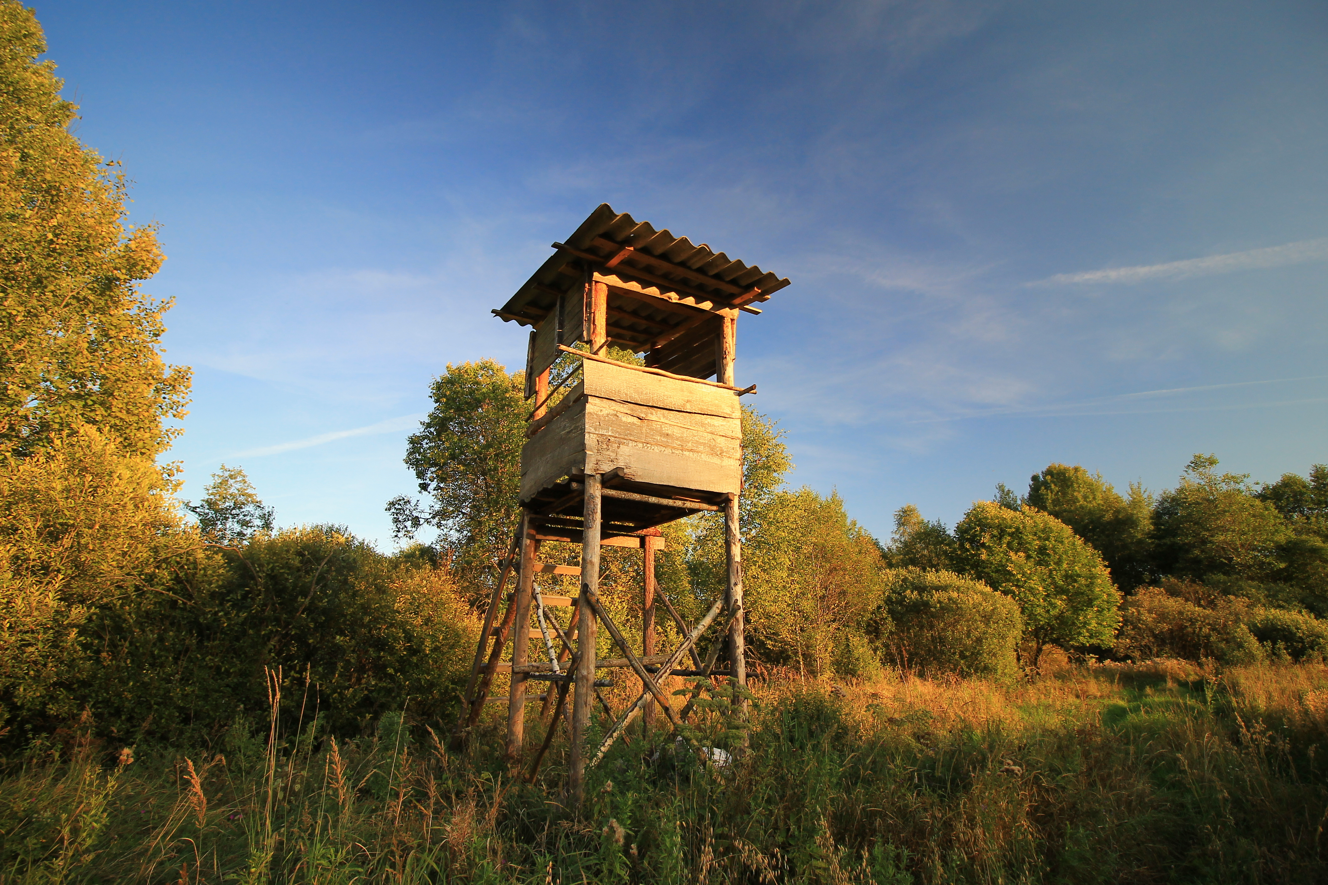 Охотничья вышка на поле в Демидовском районе Смоленской области